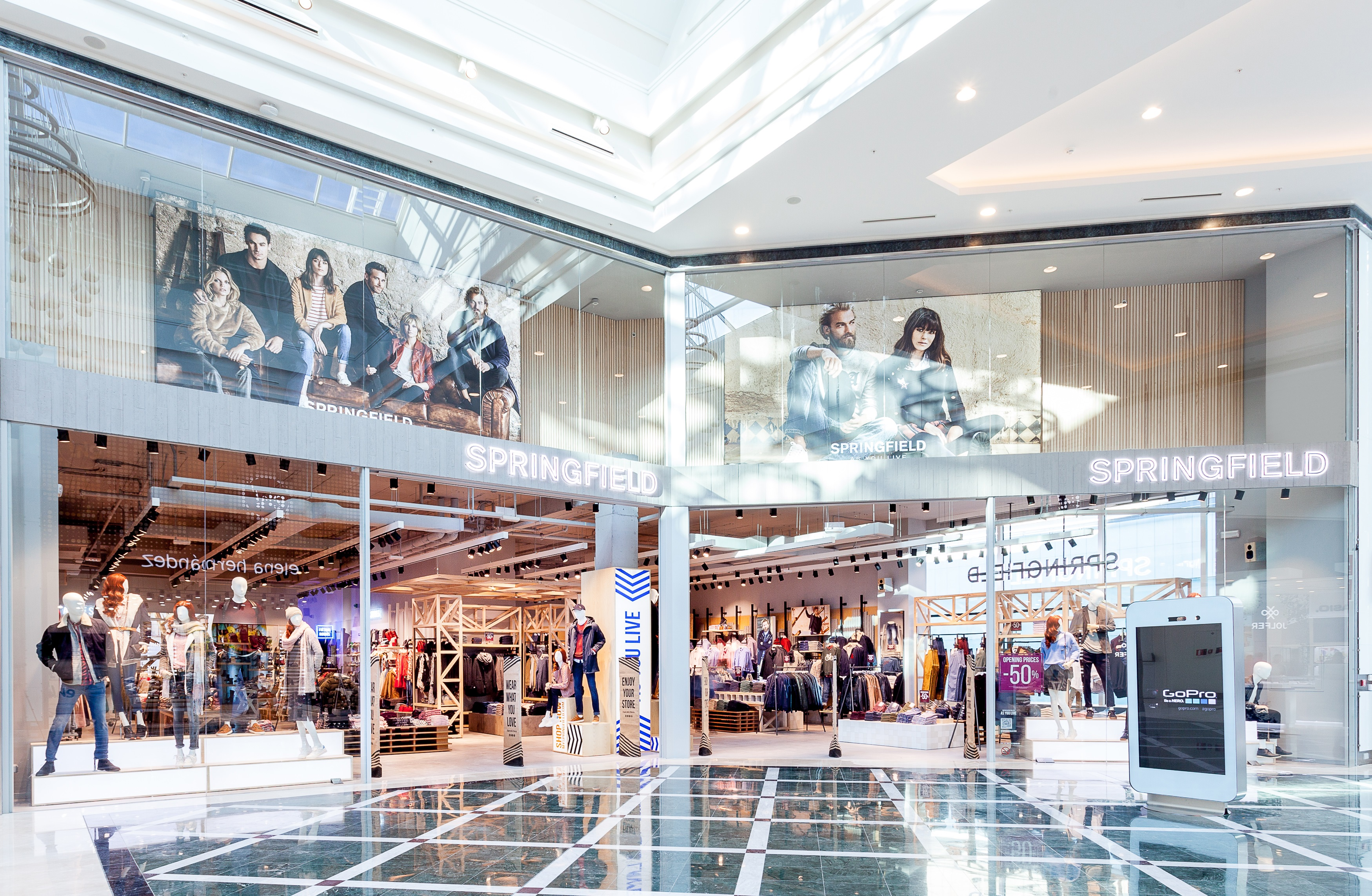 Springfield Plaza Rio 2 Madrid